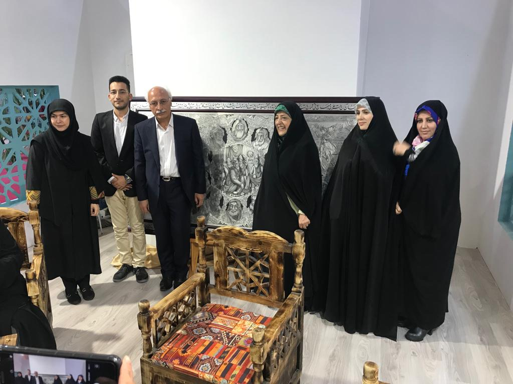 ابتکار واستاد الیاسی